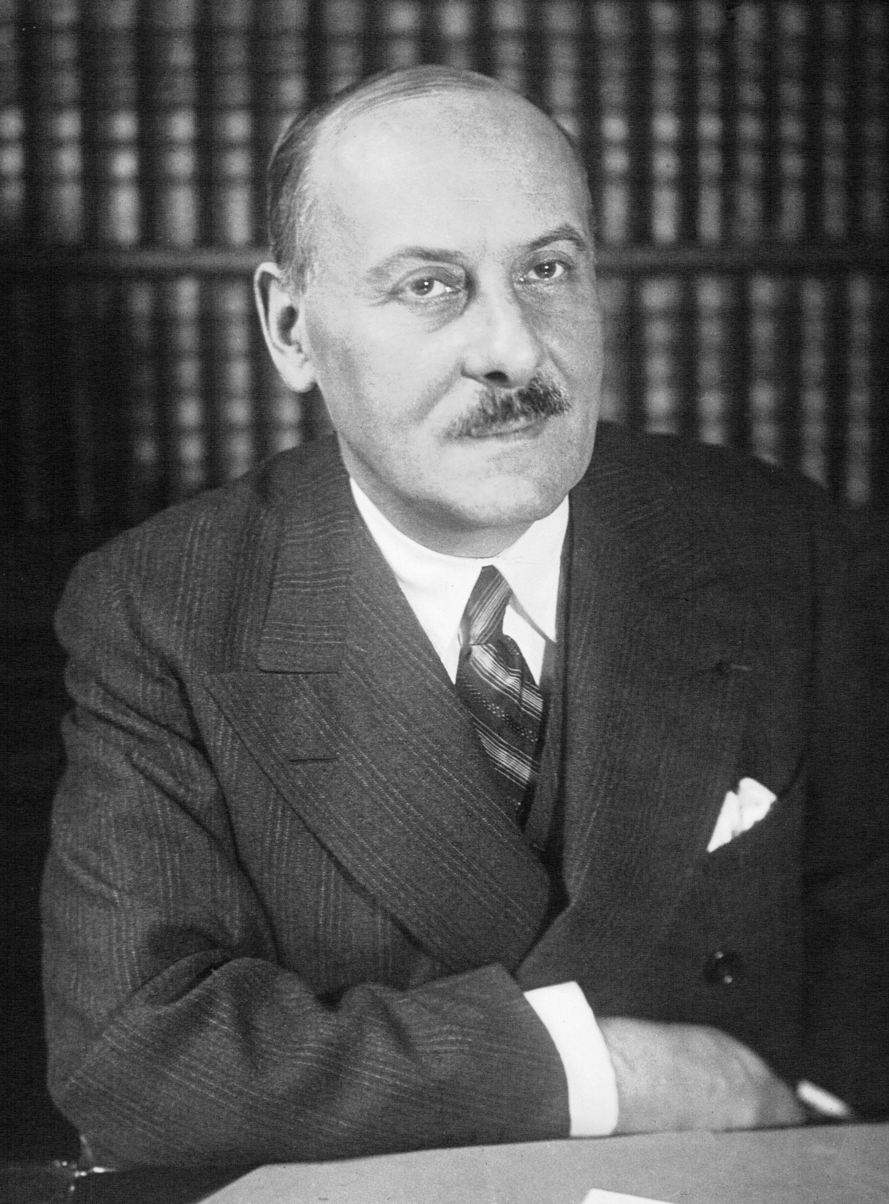 Henri de Jouvenel, sénateur, ambassadeur de France à Rome [photographie de presse]